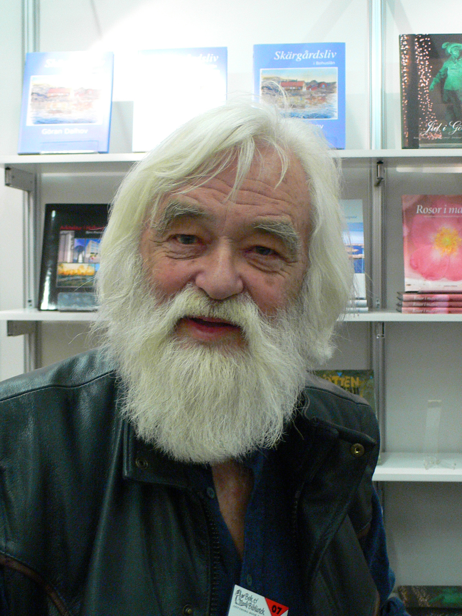 Ebbe Schön at Gothenburg Book Fair 2007, Ebbe Schön på Bok- och biblioteksmässan 2007